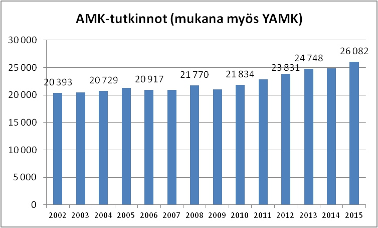 Lähde